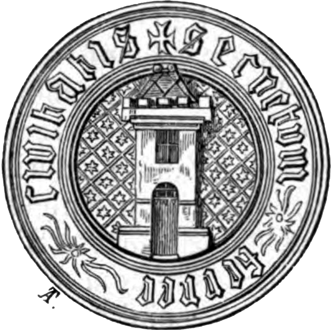 Siegel der Stadt Eisenstadt, 14tes Jahrhundert, Durchmesser: 1 Zoll und 4 Linien (ca. 35mm), Umschrift: + Secretvm * ferree * civitatis